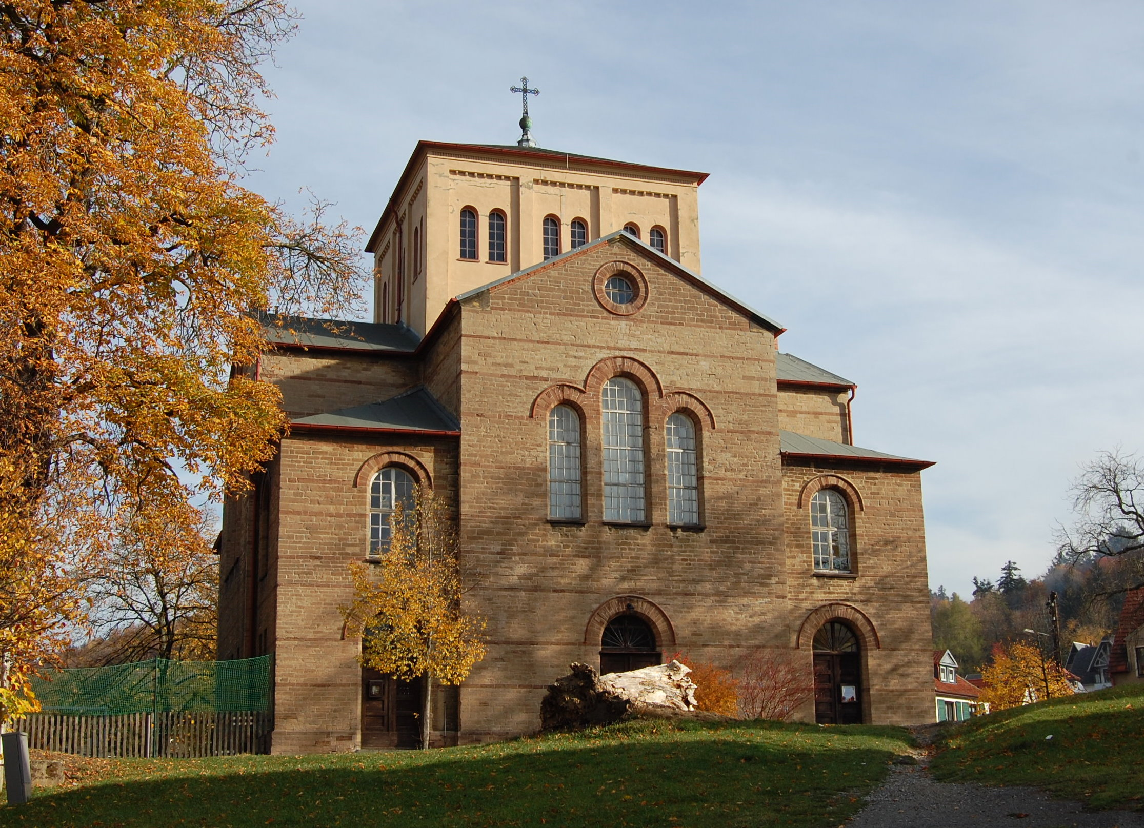 ehemalige Konkordienkirche in Hasserode, heute Gemeindehaus der Christuskirche